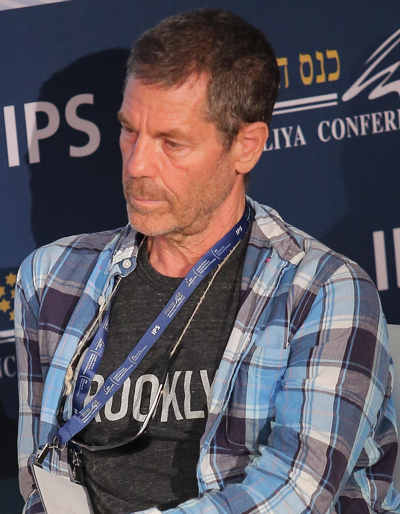 אוהד נהרין בכנס הרצליה 2016 של המכון למדיניות ואסטרטגיה במרכז הבינתחומי הרצליה